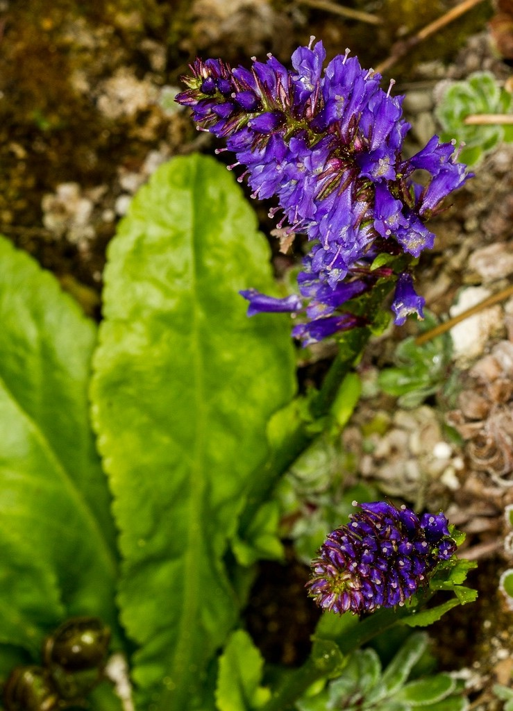 Arktisch-alpiner Garten Chemnitz: Wulfenie (Wulfenia blecicii)